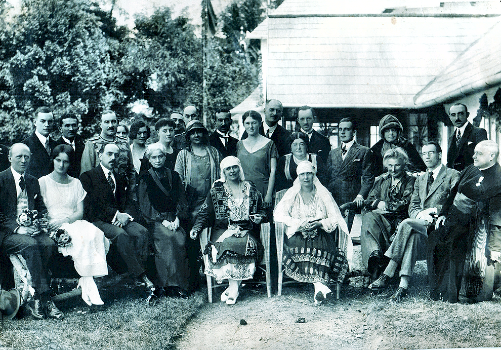 Königin Maria von Rumänien (unten, Mitte links) als Taufpatin der Maria Gräfin Della Scala 1923 mit Mitgliedern der Familien Della Scala, Wassilko von Serecki und Sayn Wittgenstein